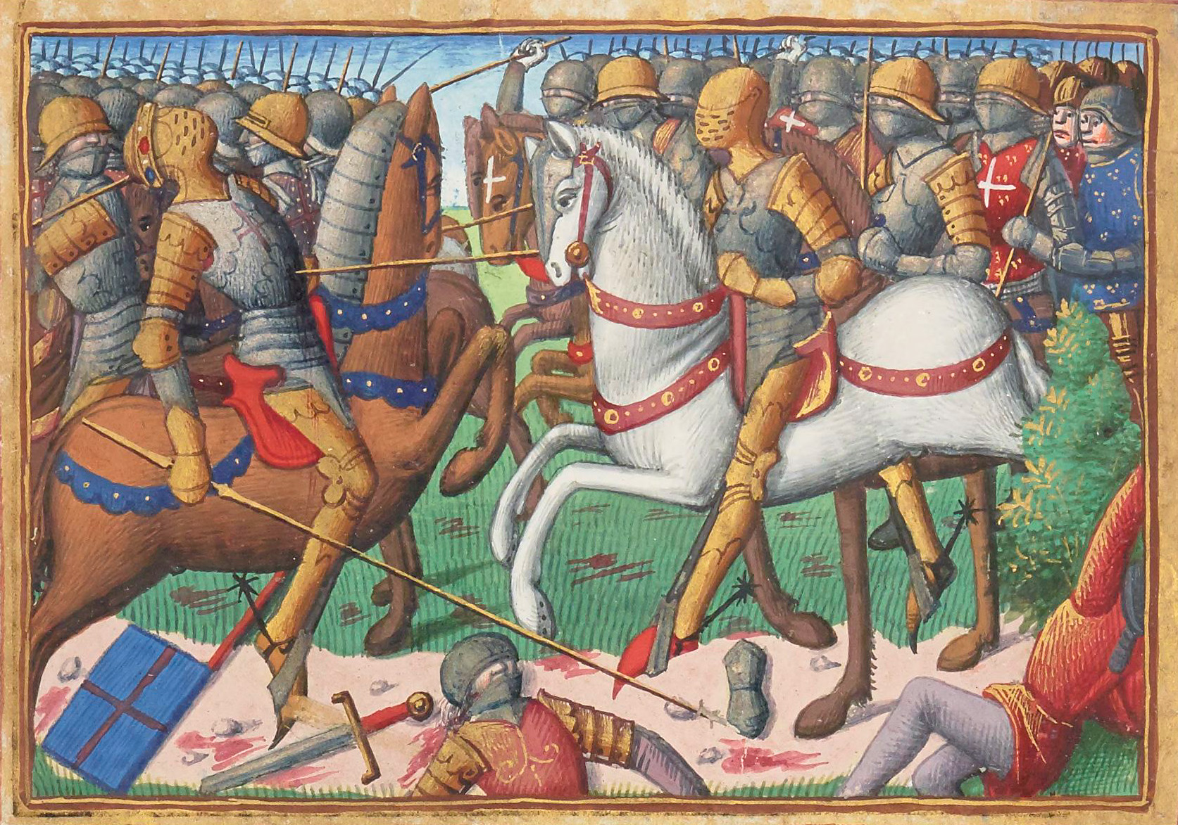 Bataille de Baugé (22 mars 1421).